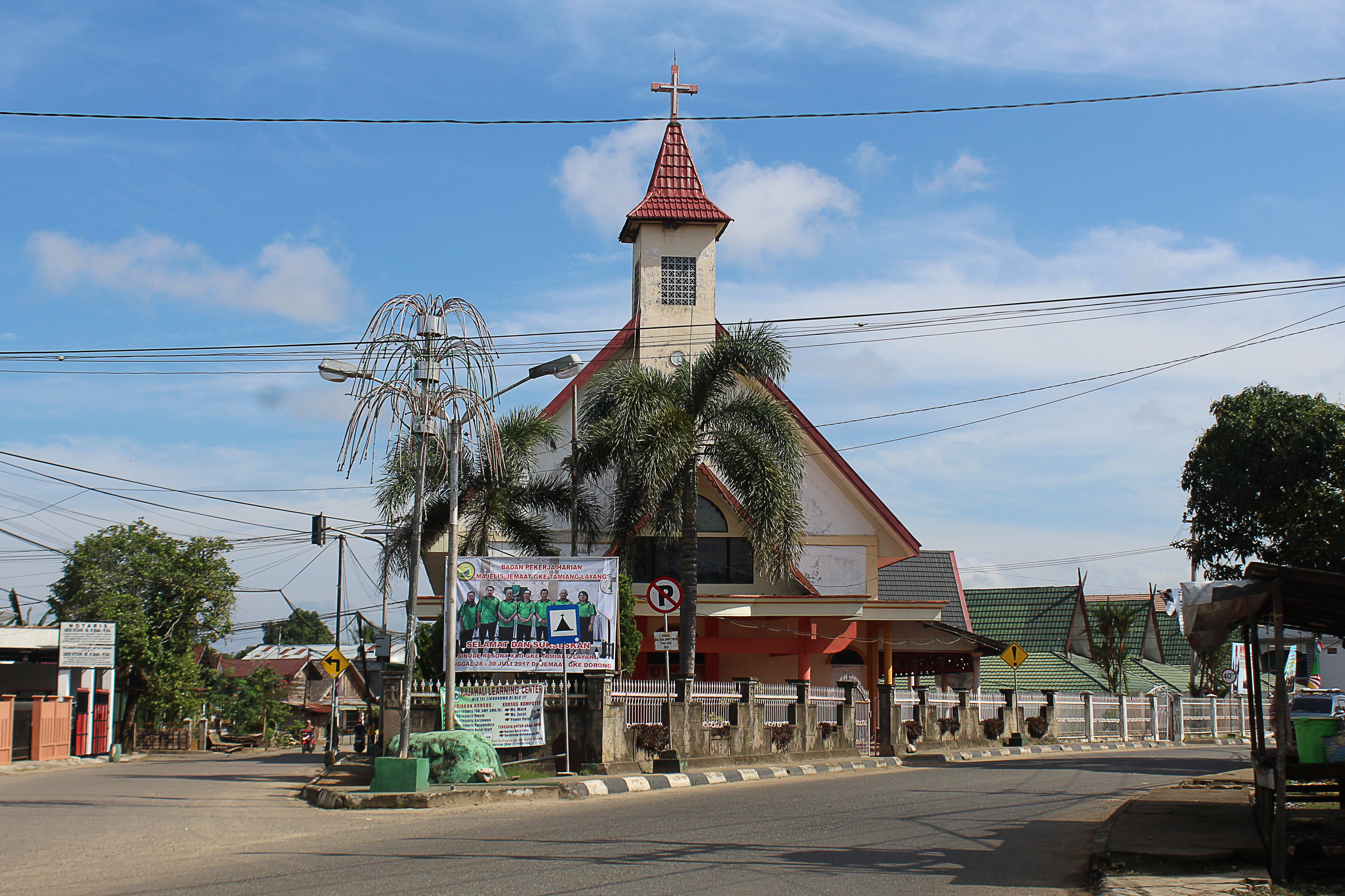 Gereja Kalimantan Evangelis (GKE) Palanungkai, salah satu gereja tertua di Kalimantan Tengah.